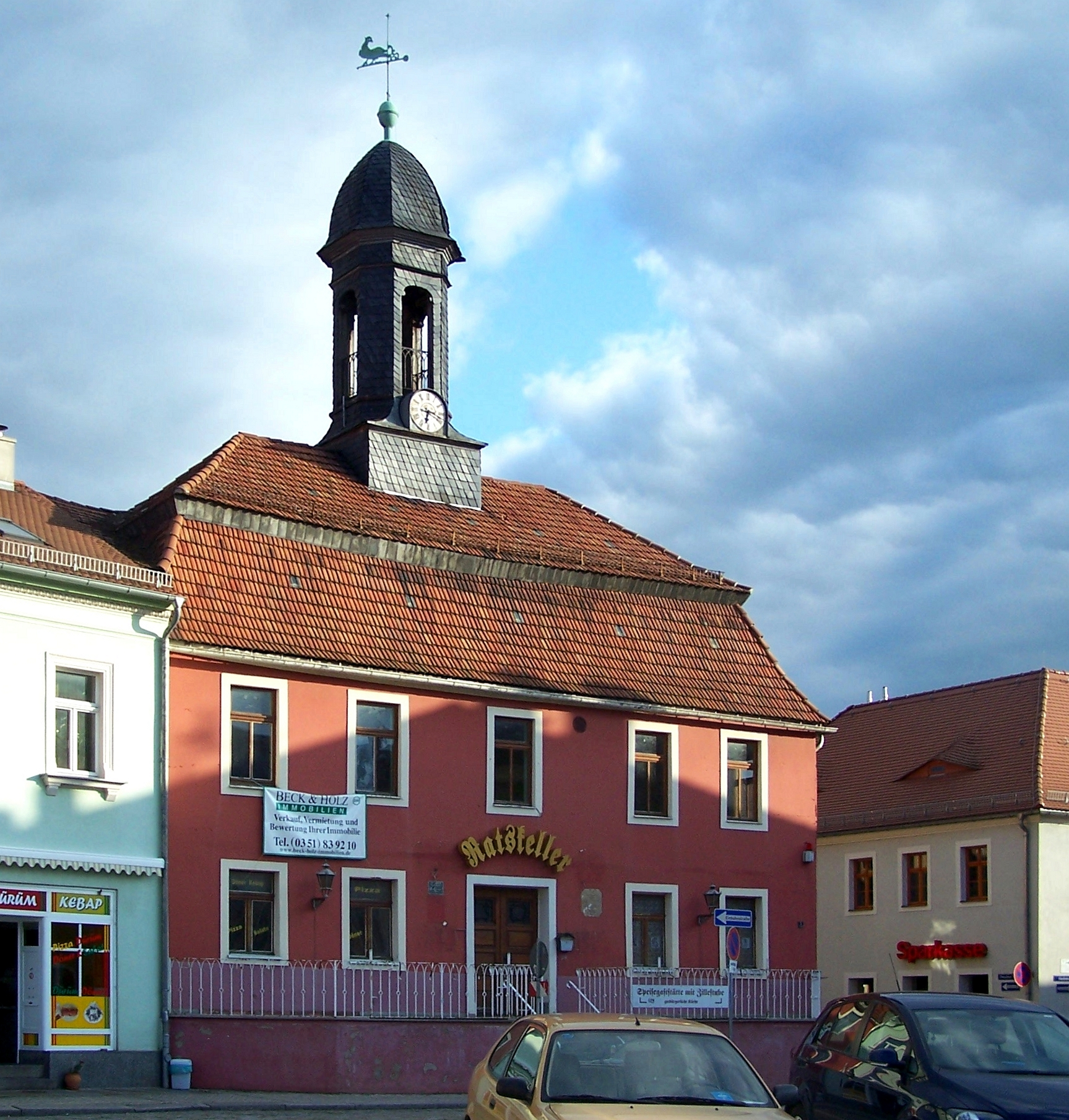 Ratskeller